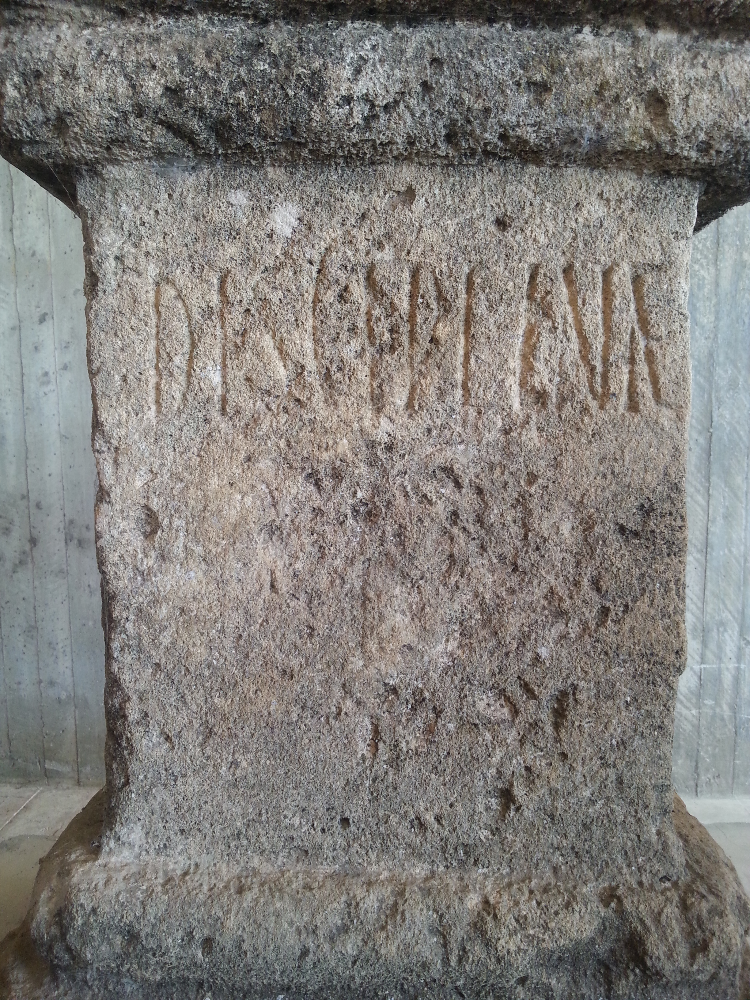 Altar de la disciplina. Es raro encontrar el nombre de Disciplina únicamente; la mayoría de las veces va acompañado de Militaris Augusta. Encontrado en 1951 en la casa situada al este del palacio de Gordiano de Volubilis.